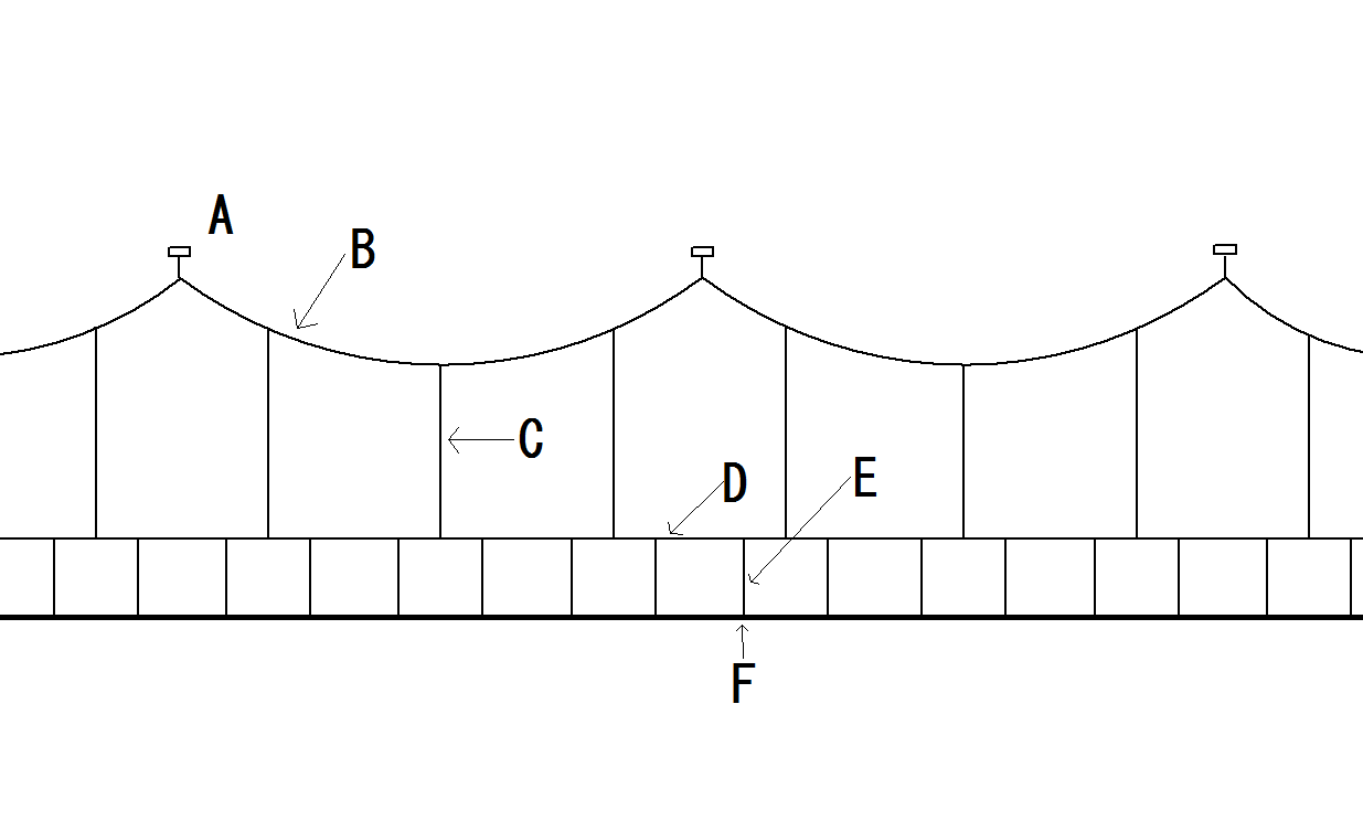 コンパウント・カテナリ式の架線。A吊架線の支持点の碍子等、B吊架線、Cドロッパー線、D補助用吊架線、Eハンガー線、Fトロリー線。